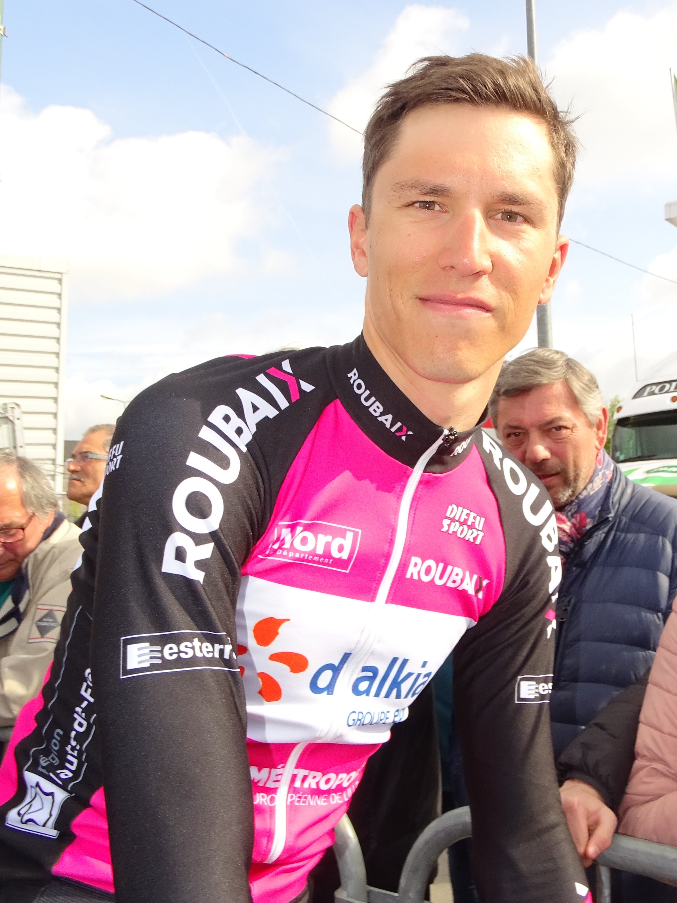 Reportage réalisé le jeudi 13 avril à l'occasion du départ et de l'arrivée du Grand Prix de Denain 2017 à Denain, Nord, Nord-Pas-de-Calais-Picardie, France.